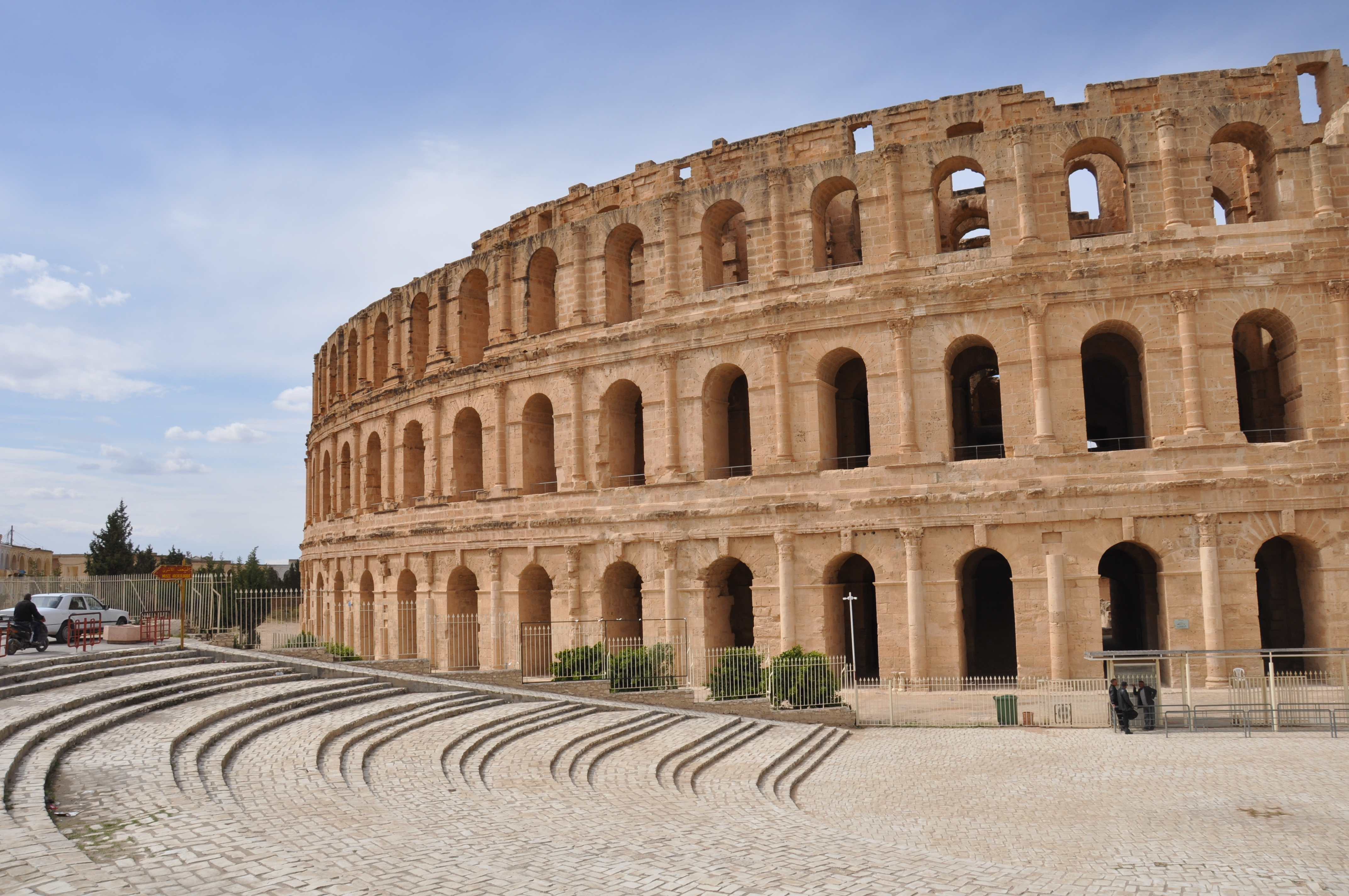 Amphithéâtre